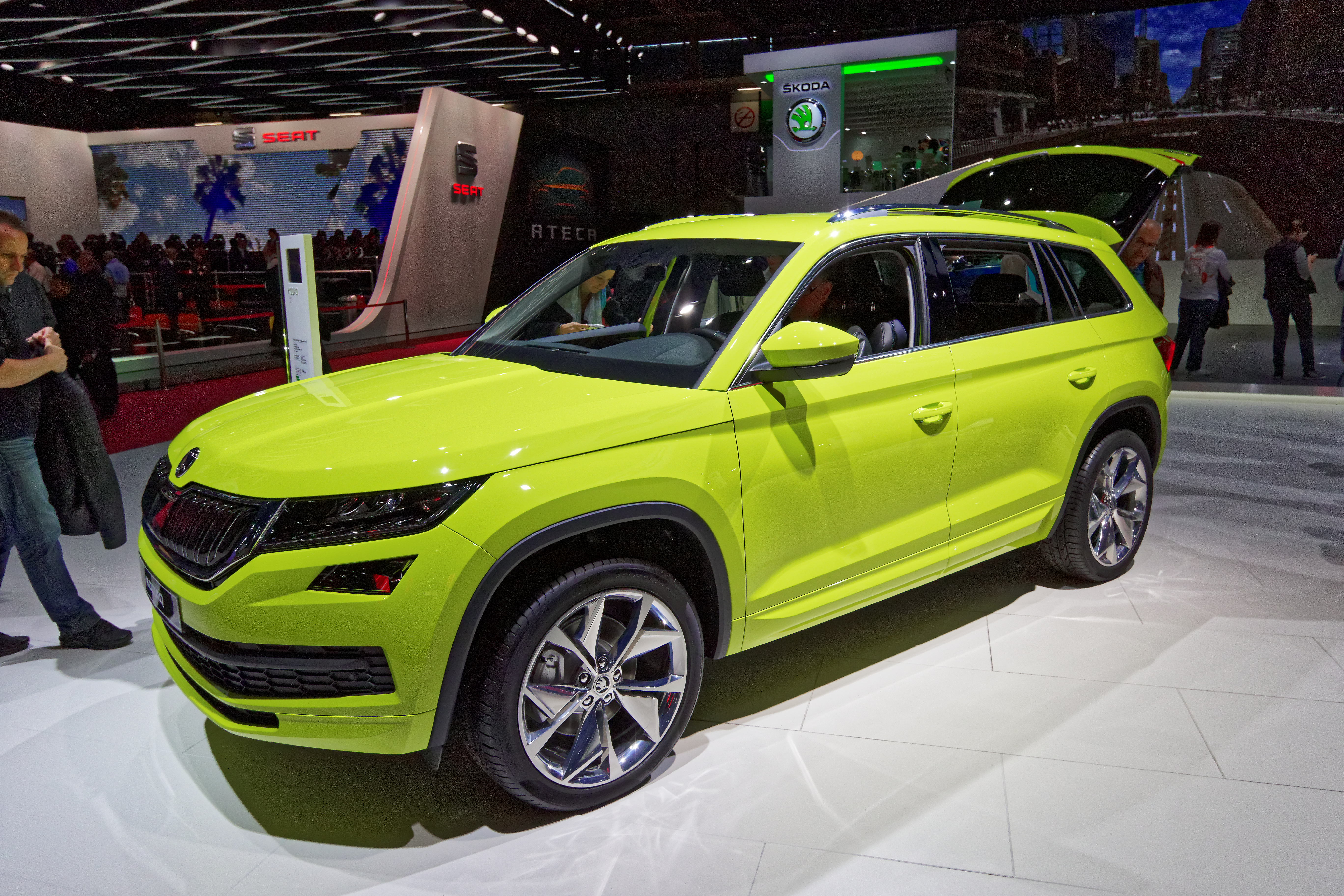 Une Skoda Kodiaq présentée lors du mondial de l'automobile de Paris 2016.